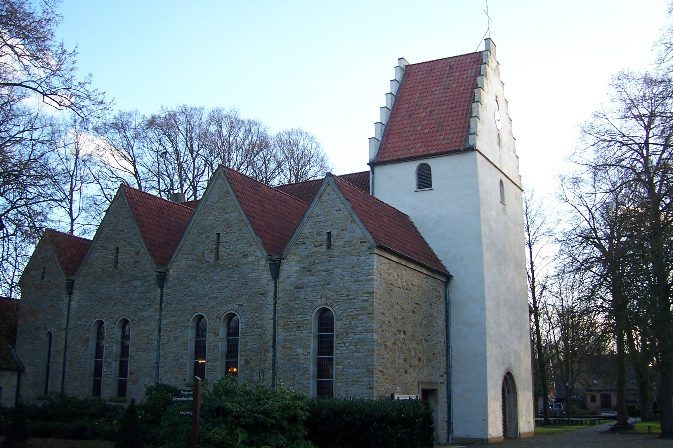 Pfarrkirche St. Mariä Geburt in Eggerode, Kreis Borken, NRW.